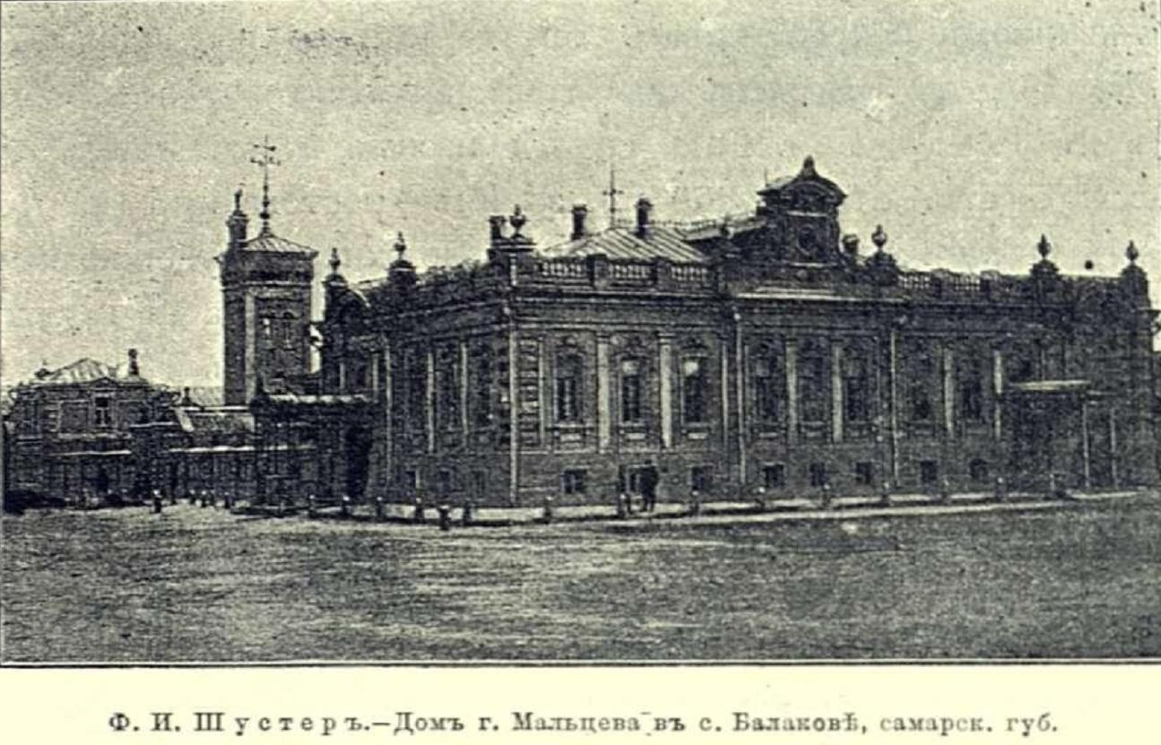 Балаково. Дом Мальцева